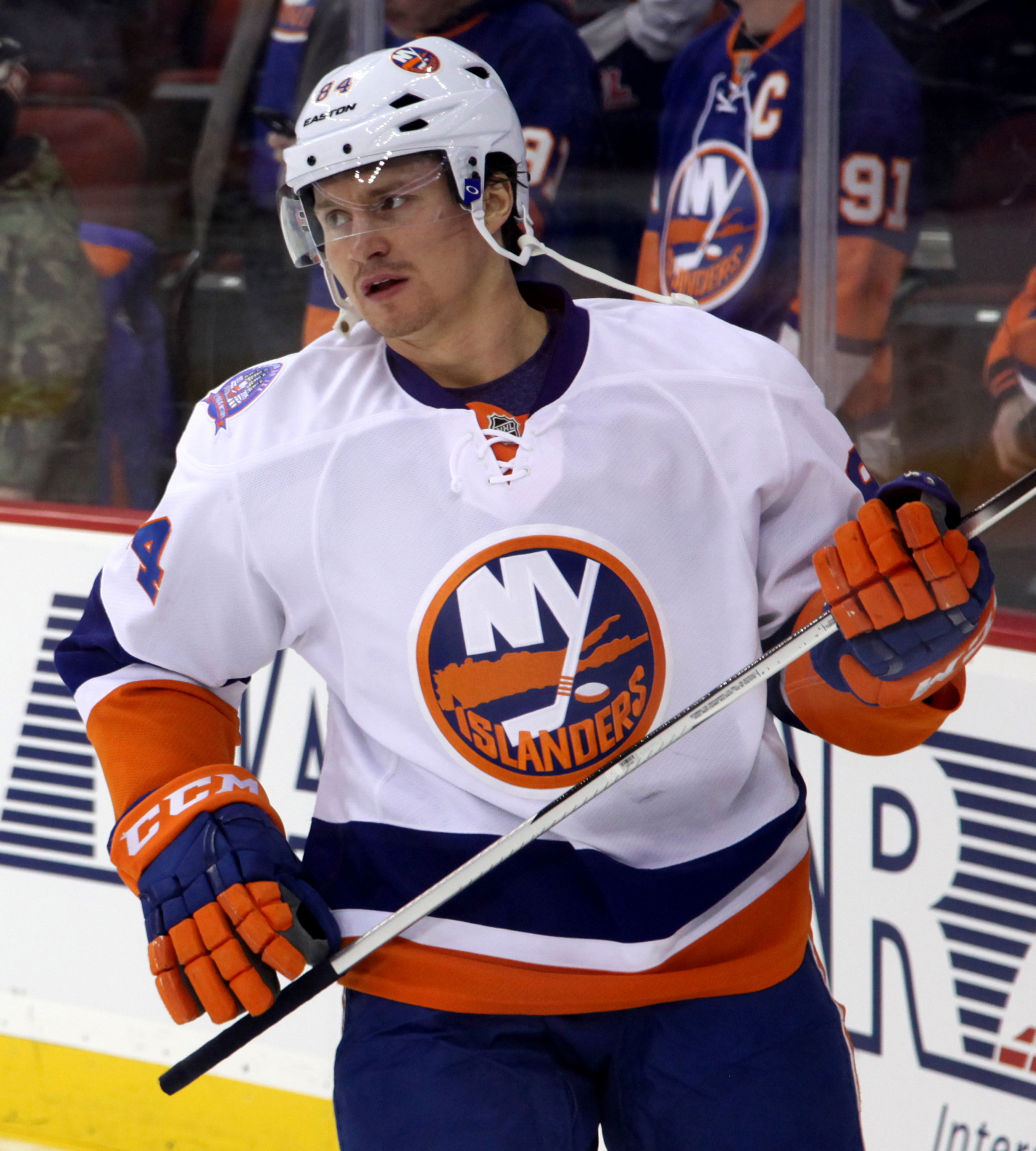 Mikhail Grabovski in January 2015.